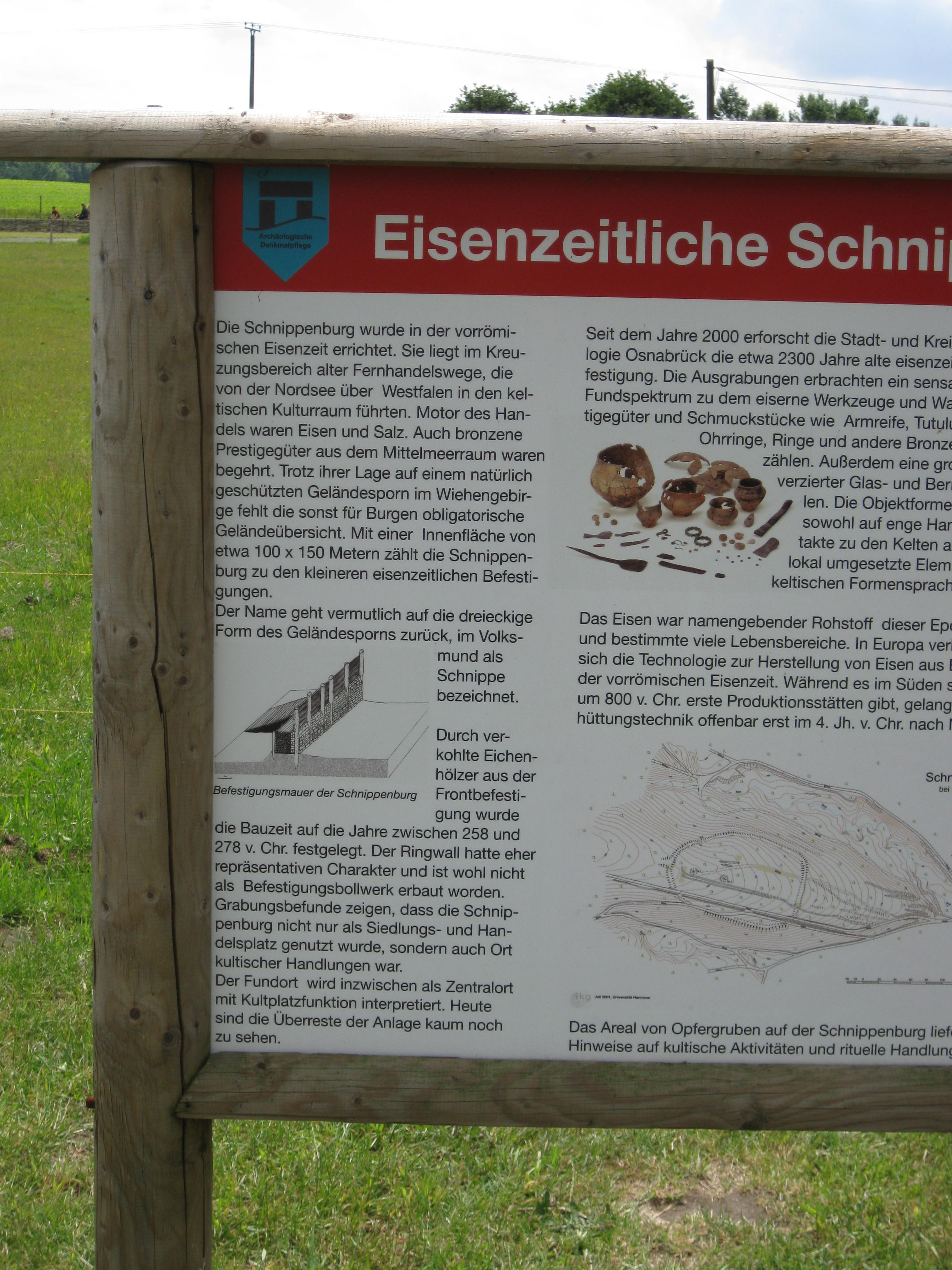 Erklärungstafel über die Schnippenburg, Landkreis Osnabrück.